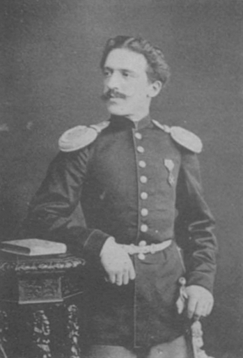 Николай Александрович Звегинцов, лифляндский губернатор. В бытность кавалергардом.